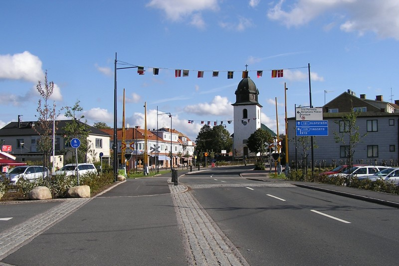 Lönsboda centrum hösten 2009.